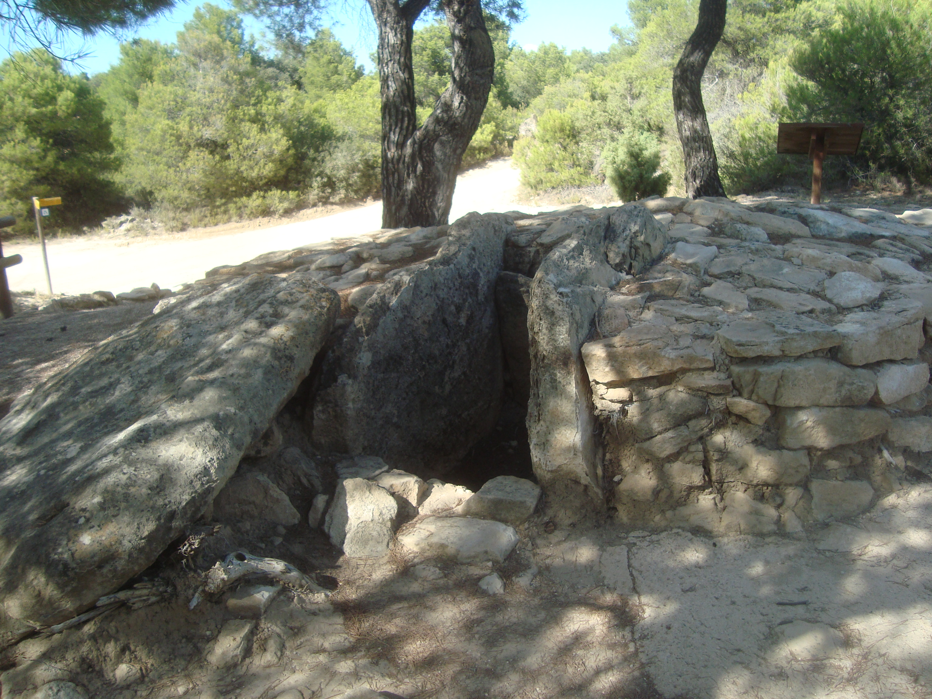 Túmulo funerario ibérico del Matarraña.